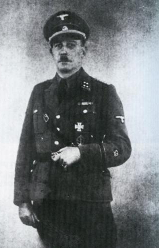 Karl Jäger (1888-1959) . Machte 1941/1942 als SS-Standartenführer und Kommandeur das Einsatzkommandos 3 Litauen"judenfrei" und führte akribisch Buch über die Ermordung der litauischen Juden.